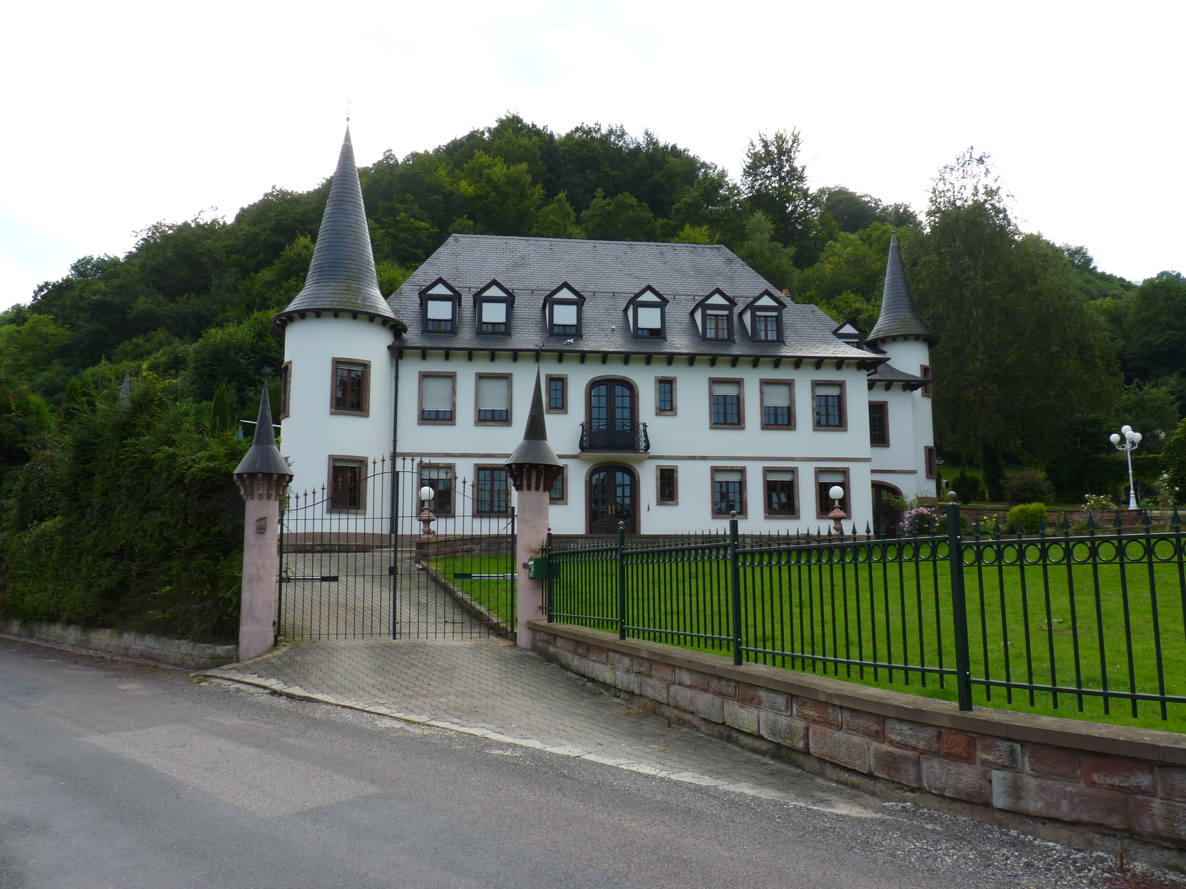 Maison de maître à Grendelbruch